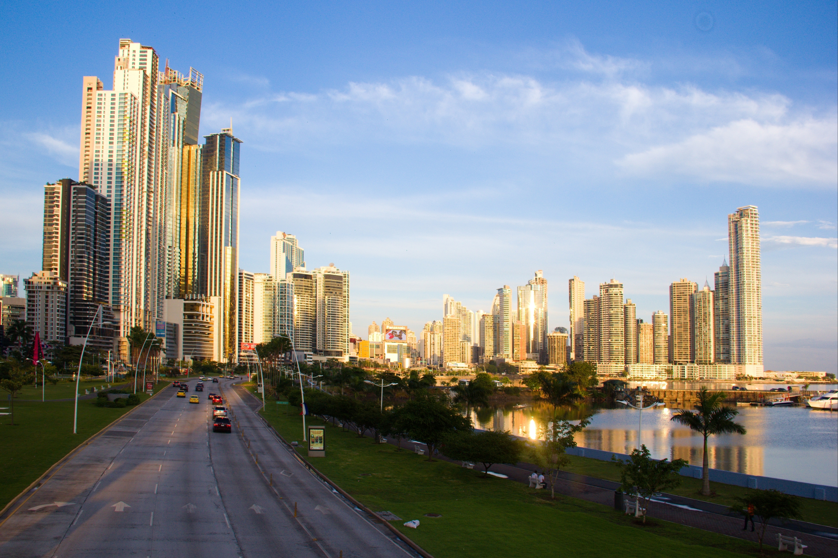 Cinta Costera, ciudad de Panamá.